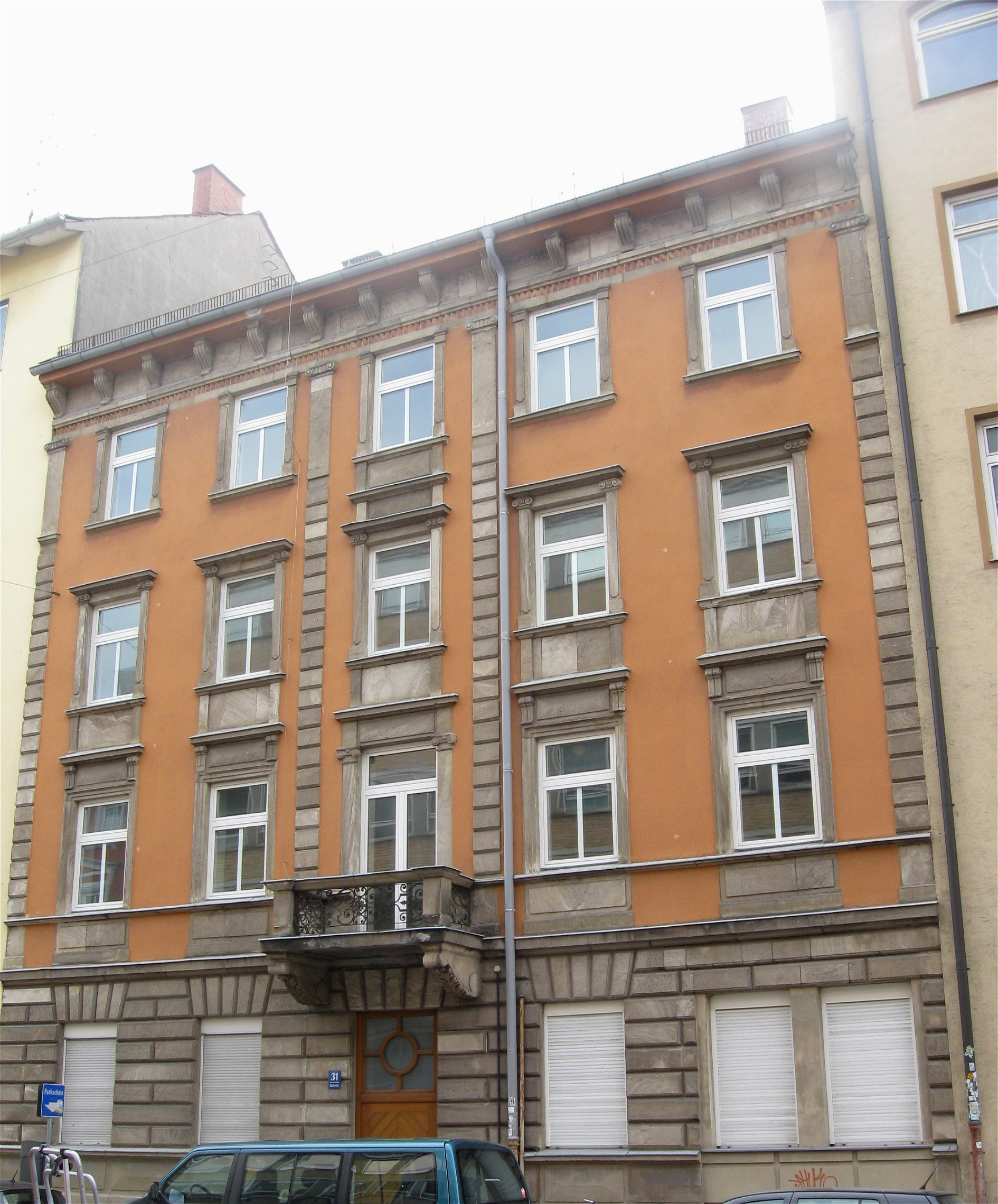 Adalbertstraße 31; Mietshaus, Neurenaissance, mit Hausteingliederung und Balkon, um 1870/80.